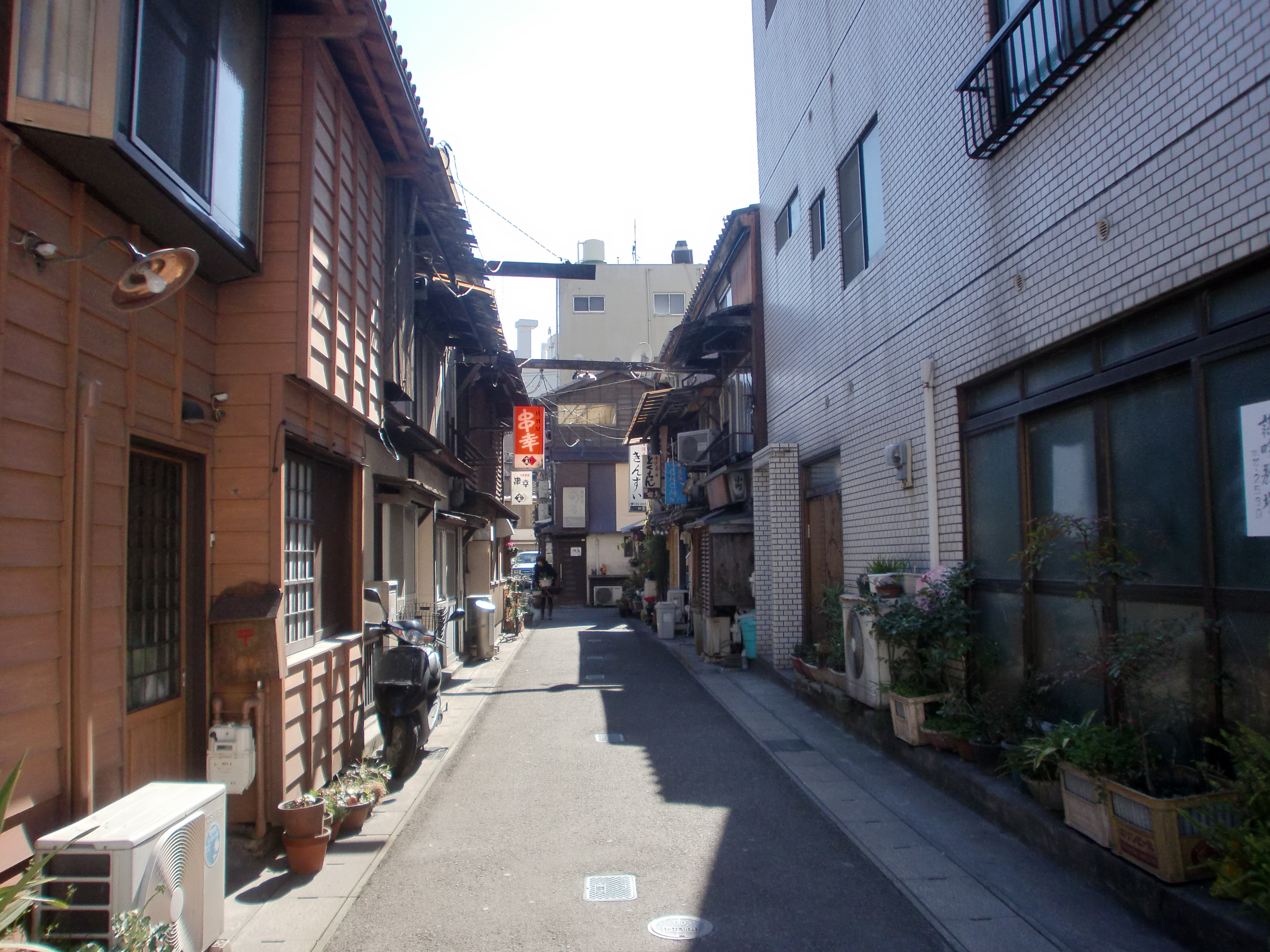 鹿児島県鹿児島市にある名山堀。飲食店が軒を連ねている。